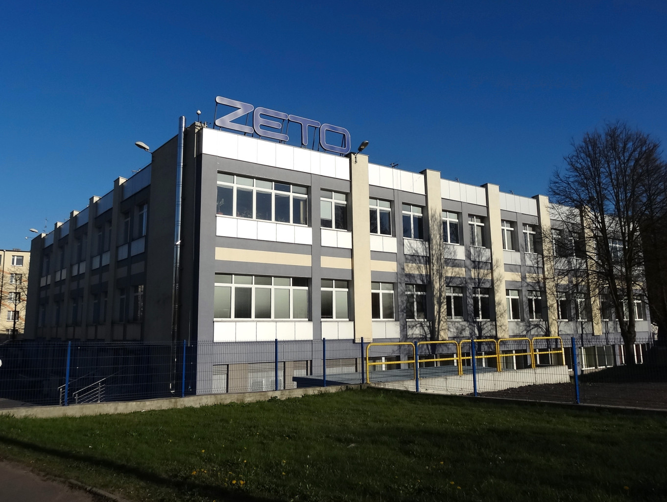 ZETO Bydgoszcz S.A. przy ul. Kurpińskiego 9 w Bydgoszczy